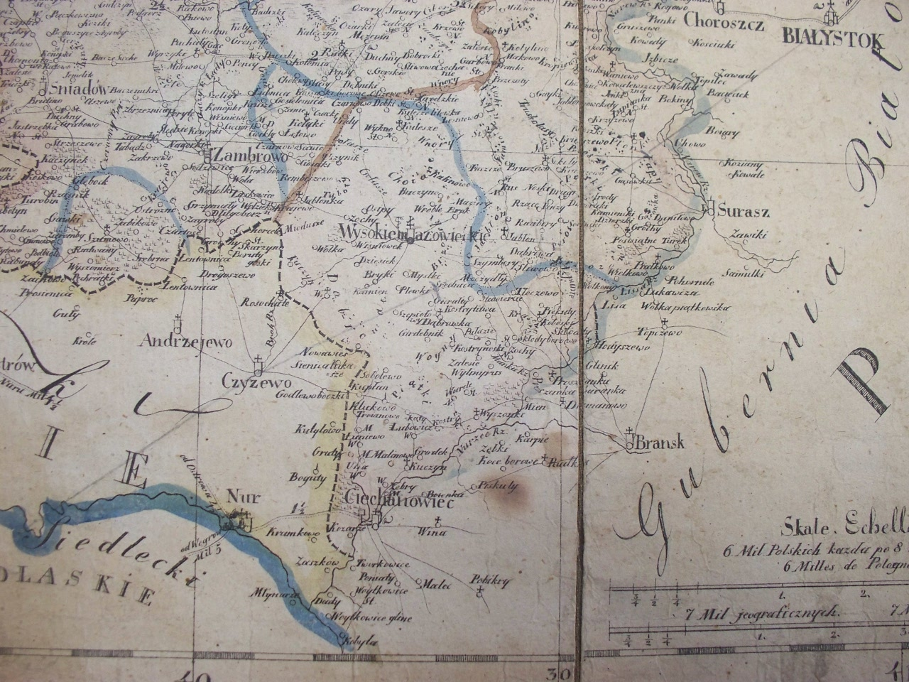 Po kongresie wiedeńskim, w 1815 r. powołano do życia Królestwo Polskie. Departament łomżyński nazwany został województwem augustowskim, w 1837 r. województwa przemianowano na gubernię. W 1842 r. obwód łomżyński, który dotąd składał się z powiatów łomżyńskiego i tykocińskiego, stał się powiatem łomżyńskim, natomiast powiat tykociński zlikwidowano. Jest to mapa fragment powiatu tykocińskiego.